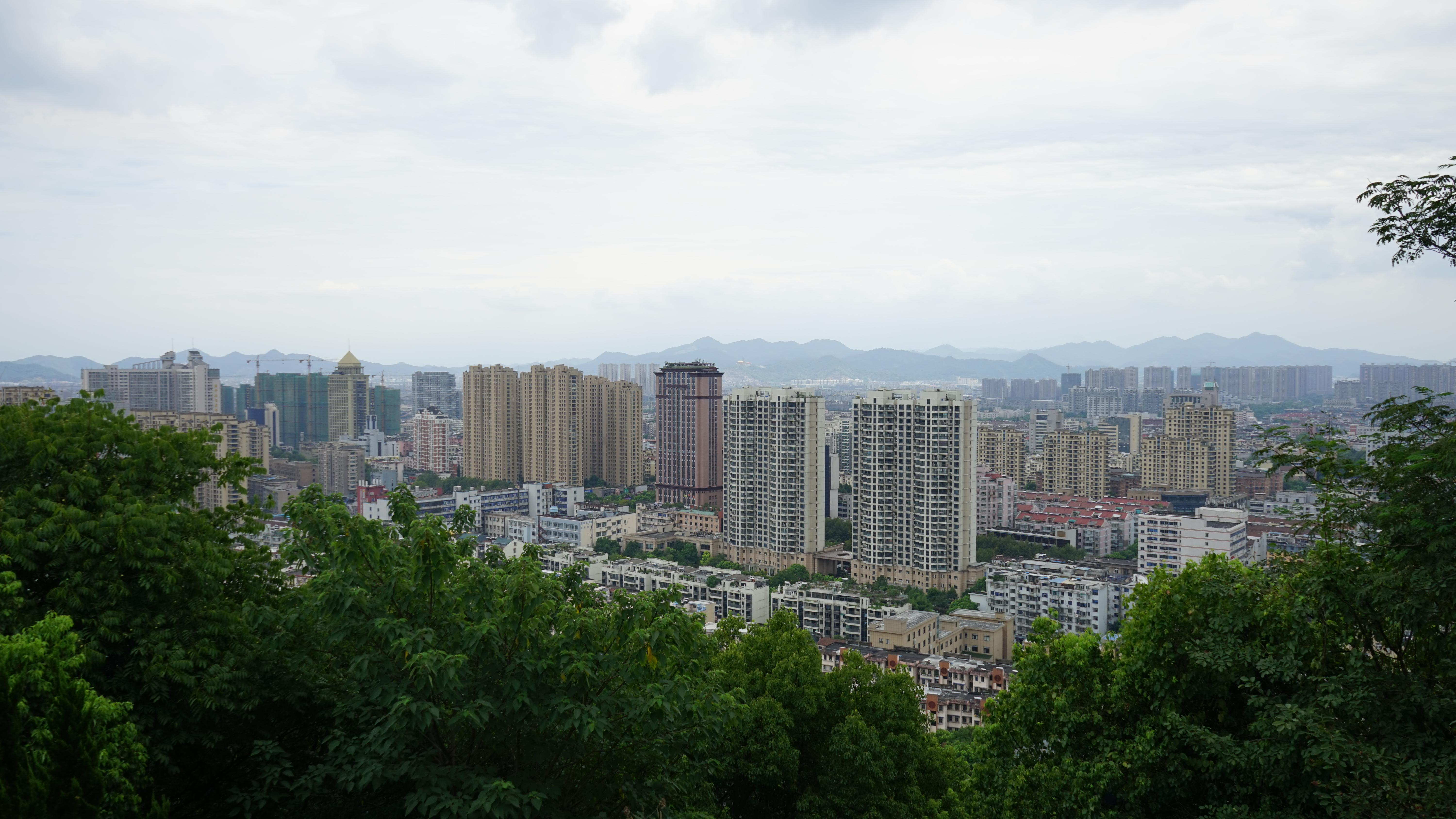 北干山顶眺望萧山城区